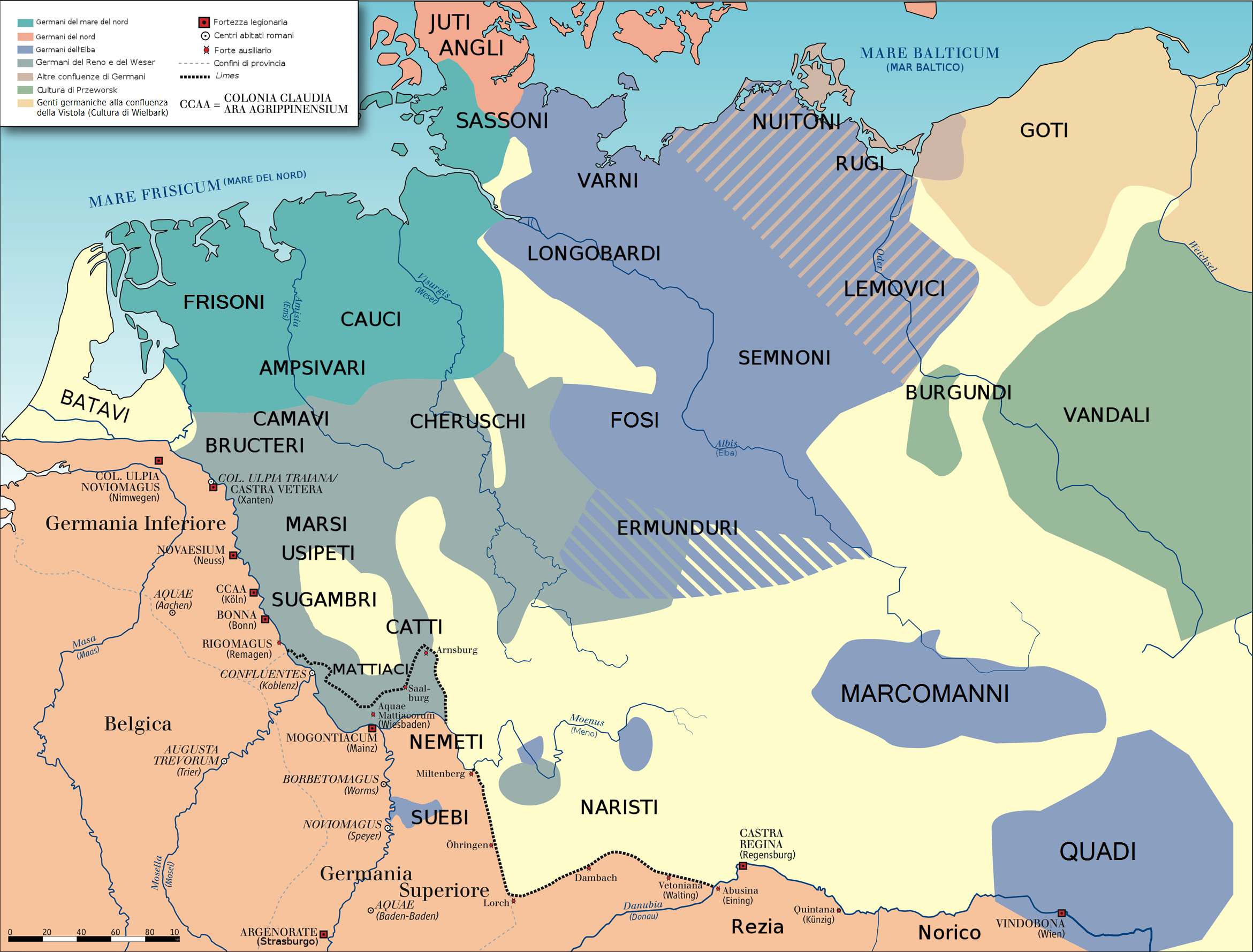 Traduzione in italiano di File:GermanenAD50.png